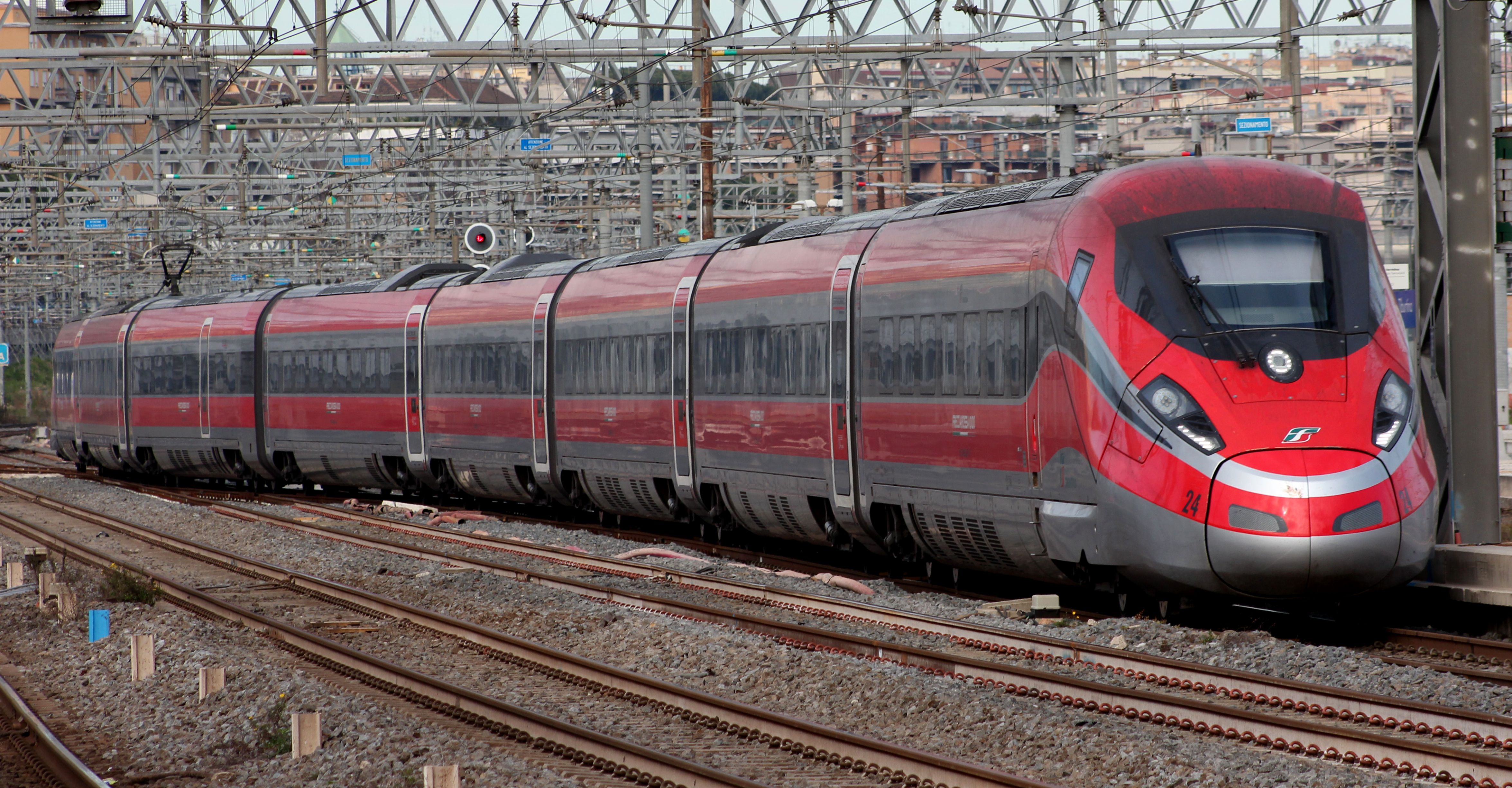 FS ETR.400